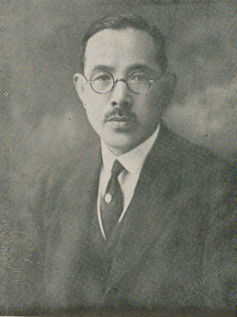 東郷実 三州名士録大鑑 上巻 - (三州名士録刊行会1930) 東郷元帥の子ではない